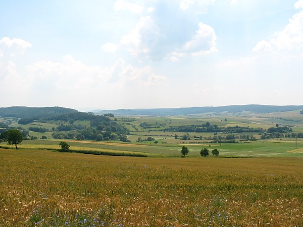 Blick auf die Fläche zwischen Angersbach und Landenhausen. Blick in Richtung Rhön.